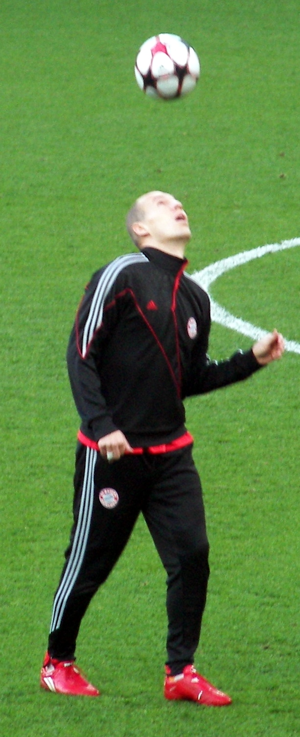 Arjen Robben